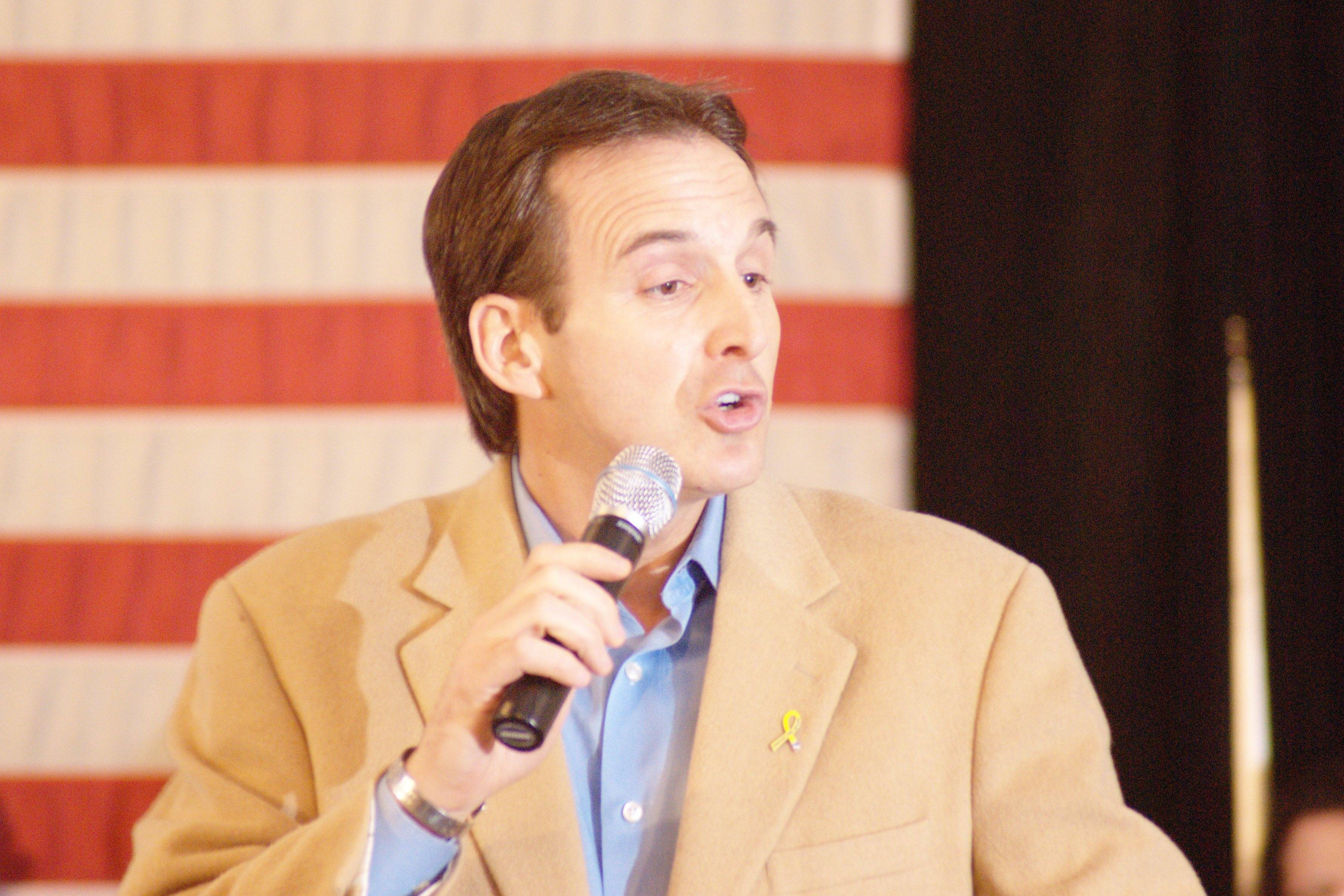 Tim Pawlenty speaking.